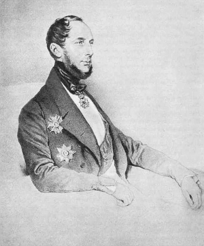 «Луи де Геккерн. Художник Йозеф Крихубер. 1843»title QS:P1476,ru:"Луи де Геккерн. Художник Йозеф Крихубер. 1843" label QS:Lru,"Луи де Геккерн. Художник Йозеф Крихубер. 1843"